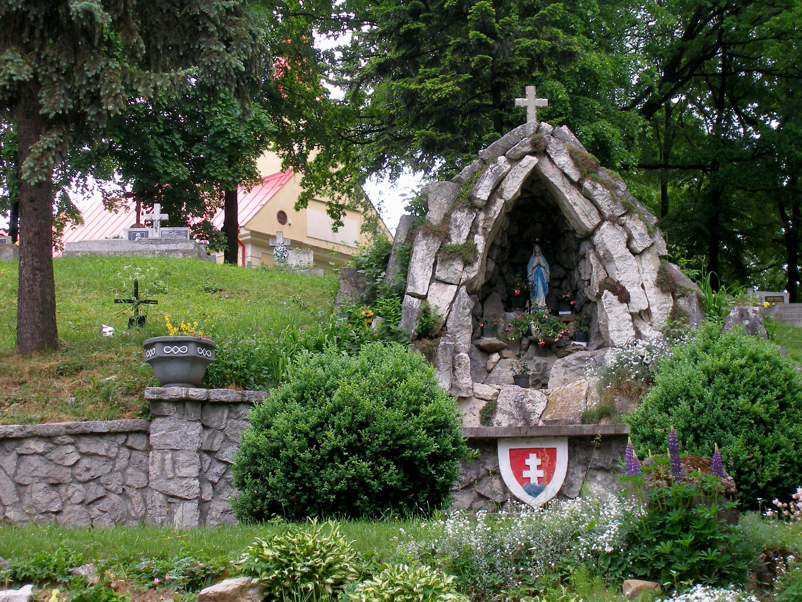 Obec Torysa okres Sabinov